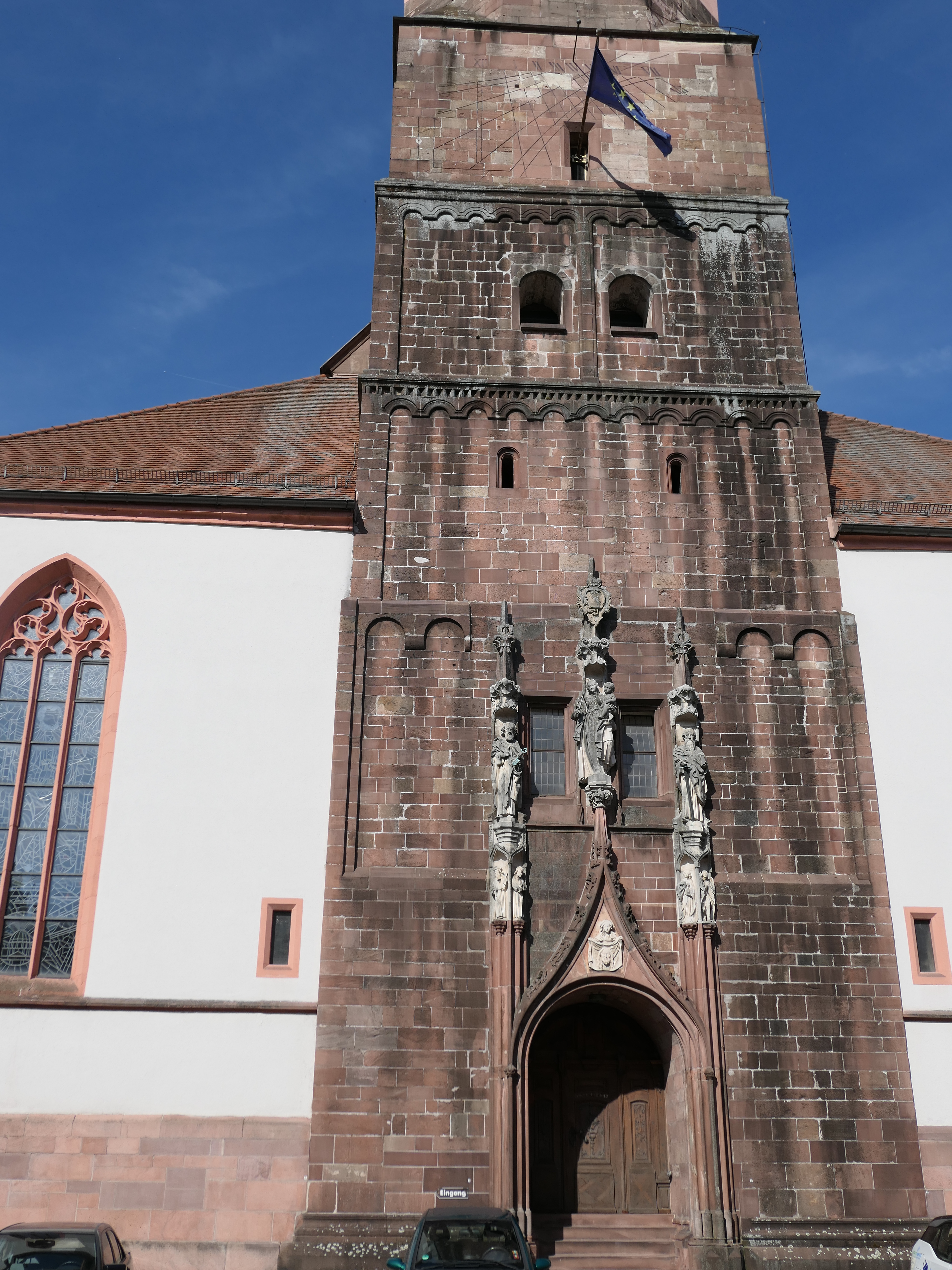 Stiftskirche Baden-Baden Turm teils romanisch